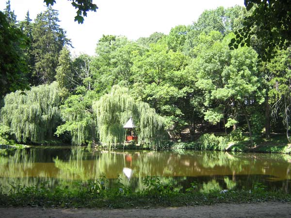 Краснокутський_дендропарк: Краснокутський_дендропарк_ставок